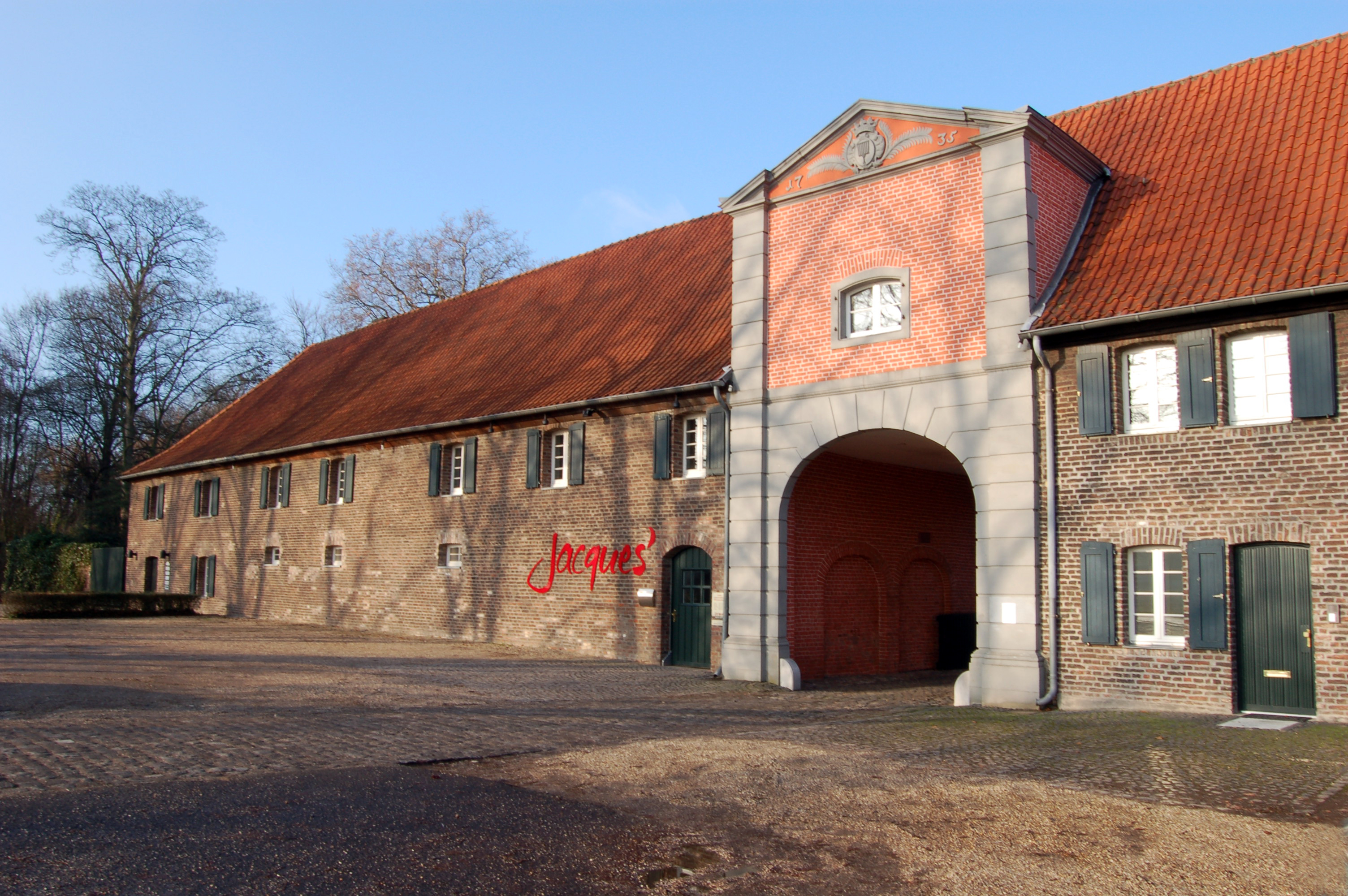 Description: Haus Meer in Meerbusch, Teilansicht der Vorderseite Source: selbst fotografiert, Dezember 2005 Photographer: Alice Wiegand, (Lyzzy)